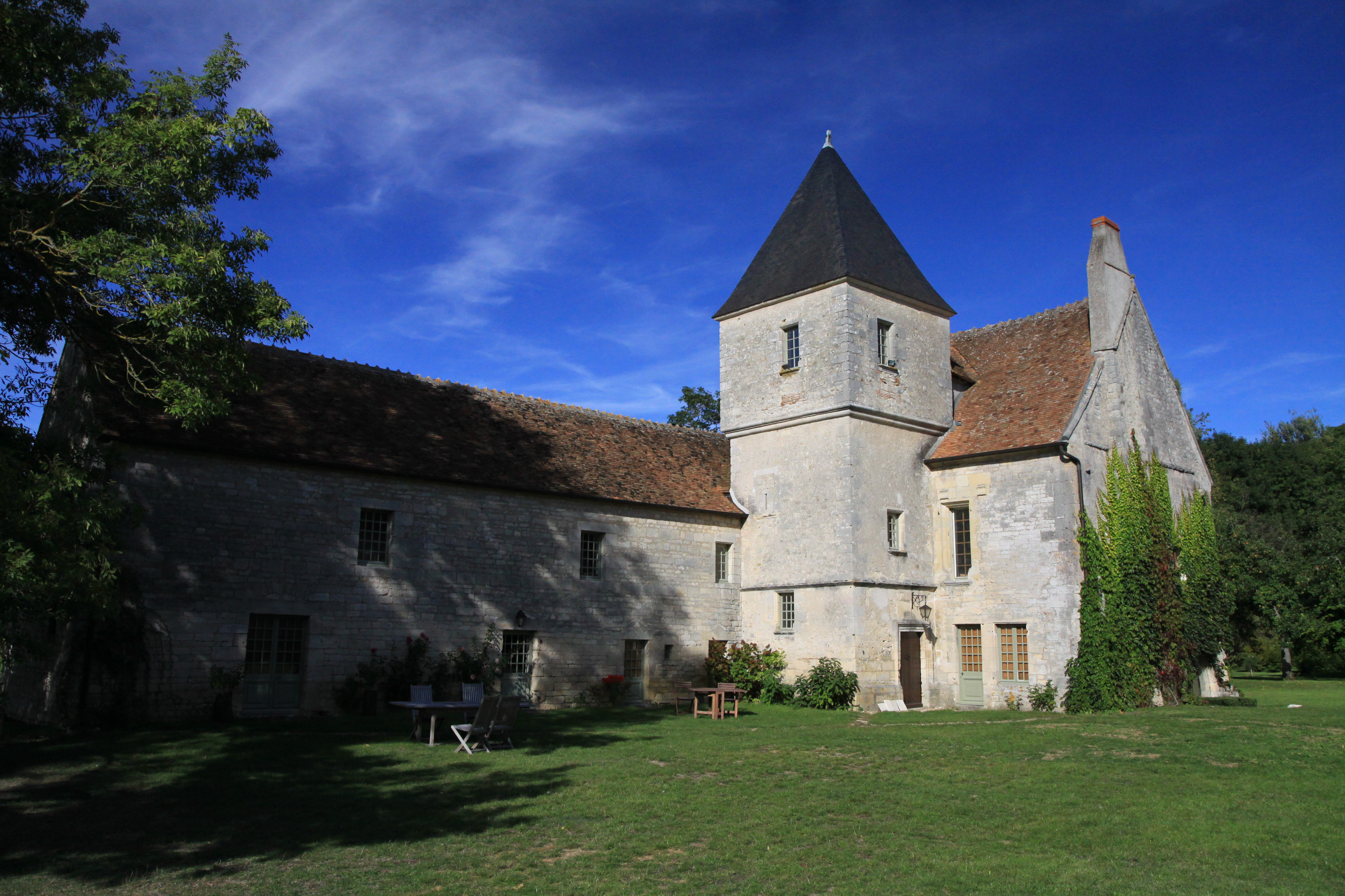 Le logis des chevaliers de la commanderie de Villemoison, la tour abrite un escalier.